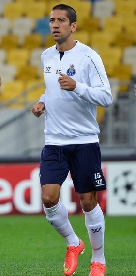 Евандро під час виступів за Порту